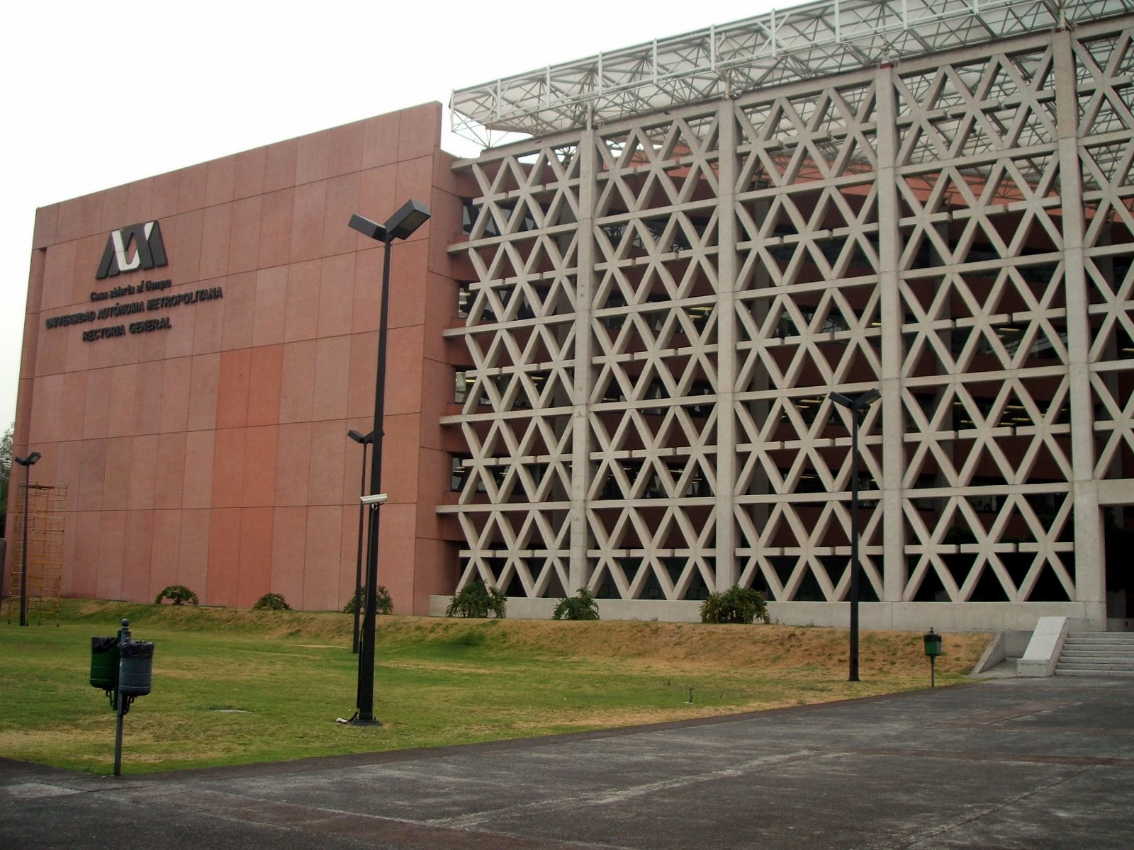 Foto de la Rectoria General de la UAM